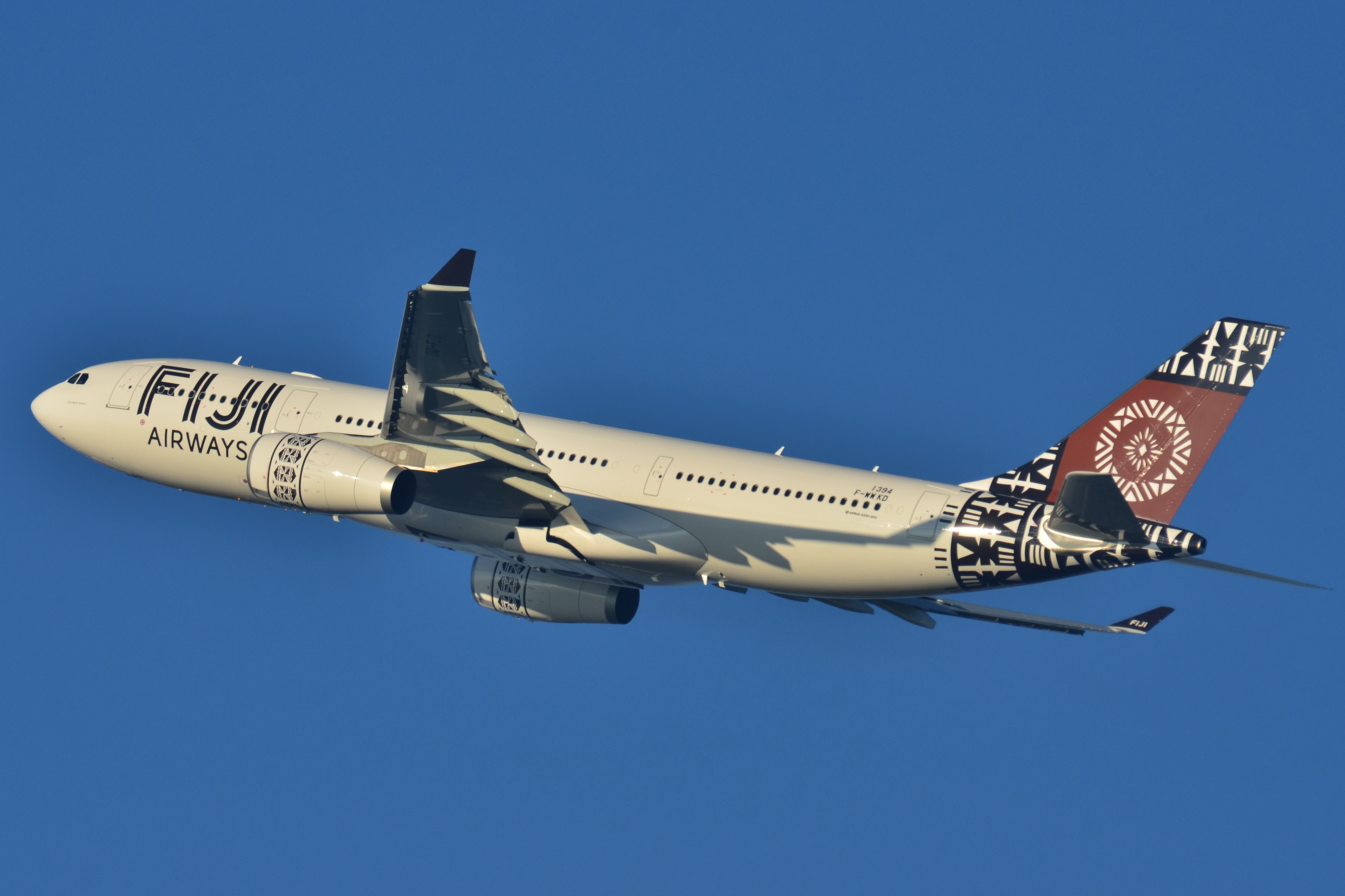 Photo prise à l'aéroport de Toulouse-Blagnac (LFBO) en France. Picture take at Toulouse-Blagnac Airport (LFBO) in France.